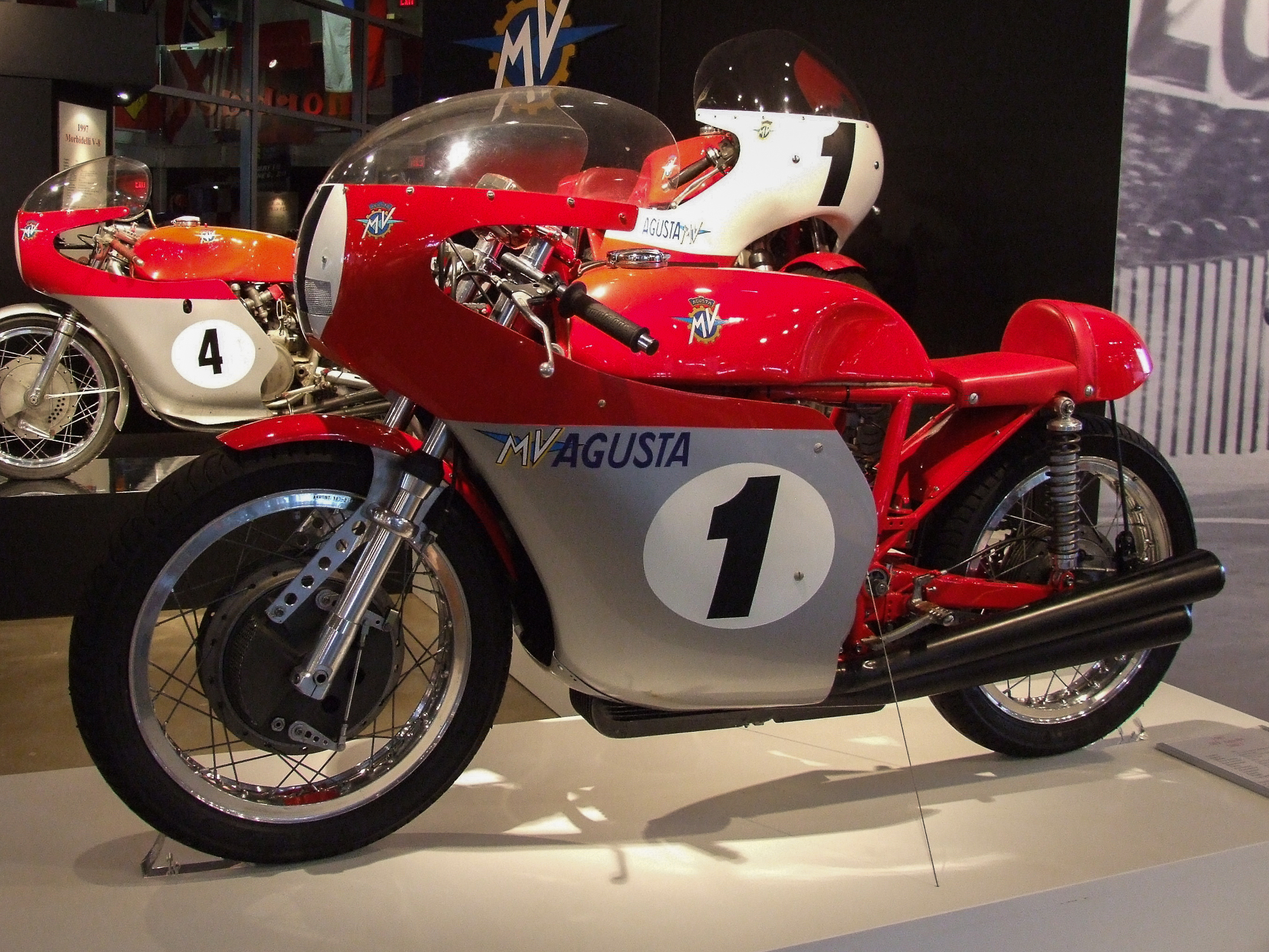 MV Agusta 500/3 (1967) im Barber Vintage Motorsports Museum, Birmingham Alabama USA